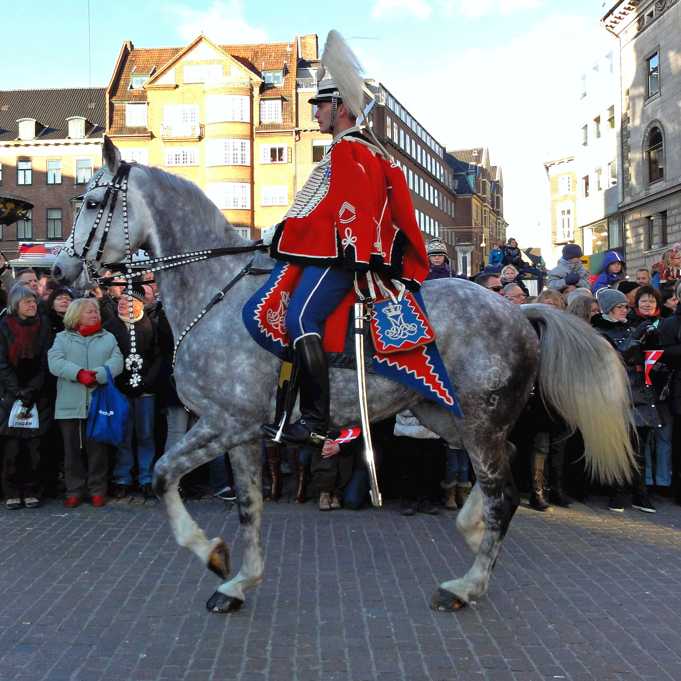 Celebração dos quarenta anos de reinado de Sua Majestade Dinamarquesa. Cavaleiro do Regimento da Guarda Hussar.